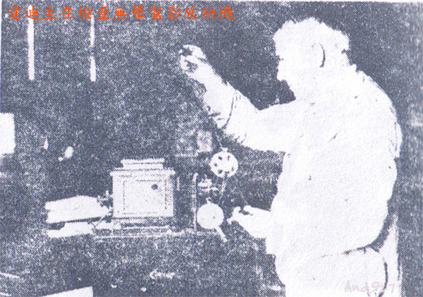 湯馬士．艾爾巴．愛迪生正喺度檢查緊佢發明嘅冇聲電影。